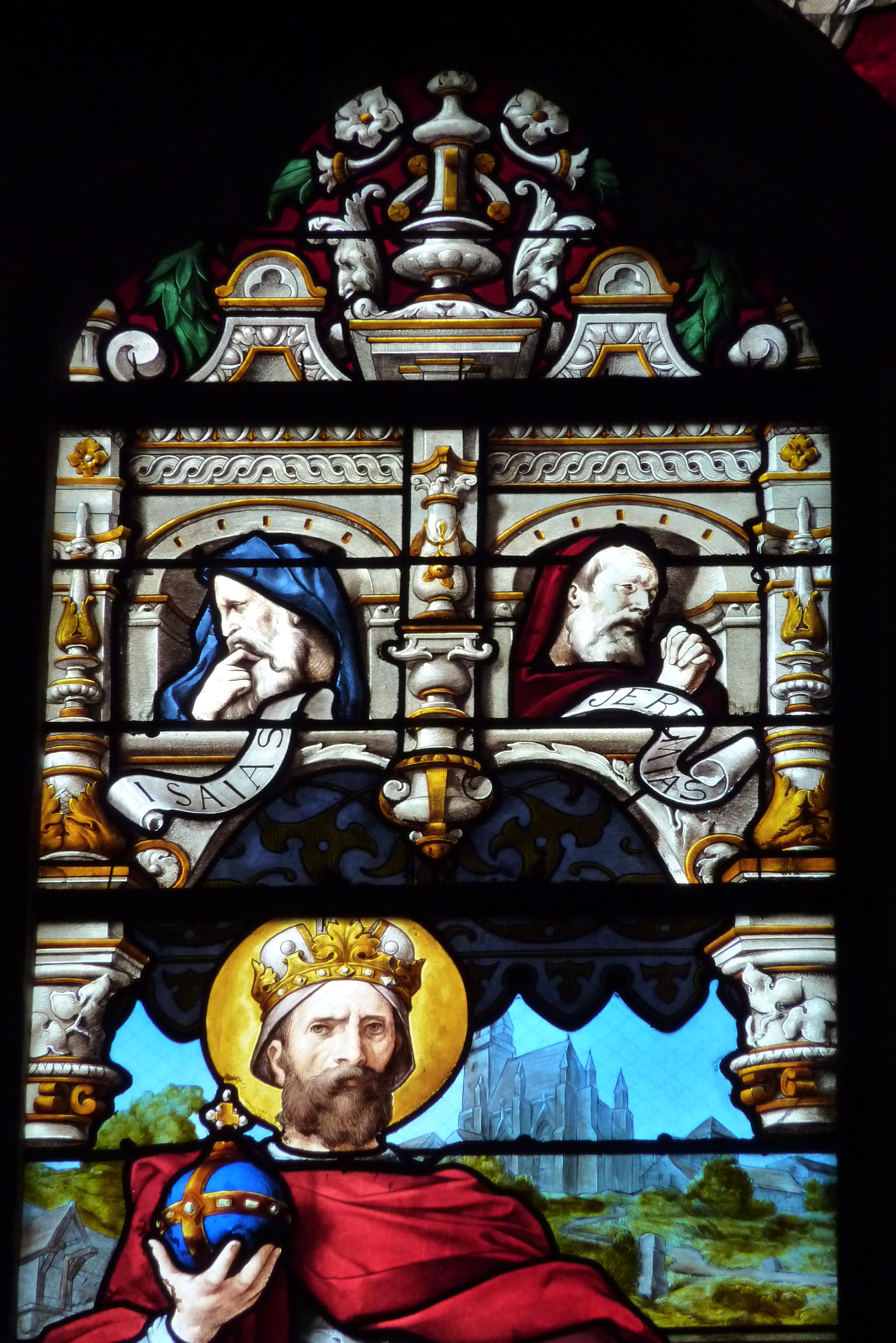 Ausschnitt des Bleiglasfensters Nr. 14 (19. Jahrhundert) in der katholischen Pfarrkirche Saint-Martin (Collégiale Saint-Martin) in Montmorency, Darstellung: Heinrich der Heilige und der Dom zu Bamberg (siehe: Dominique Foussard, Charles Huet, Mathieu Lours: Églises du Val-d'Oise. Pays de France, Vallée de Montmorency, Société d'Histoire et d'Archéologie de Gonesse et du Pays de France, 2. Auflage, Gonesse 2011, ISBN 9782953155426)